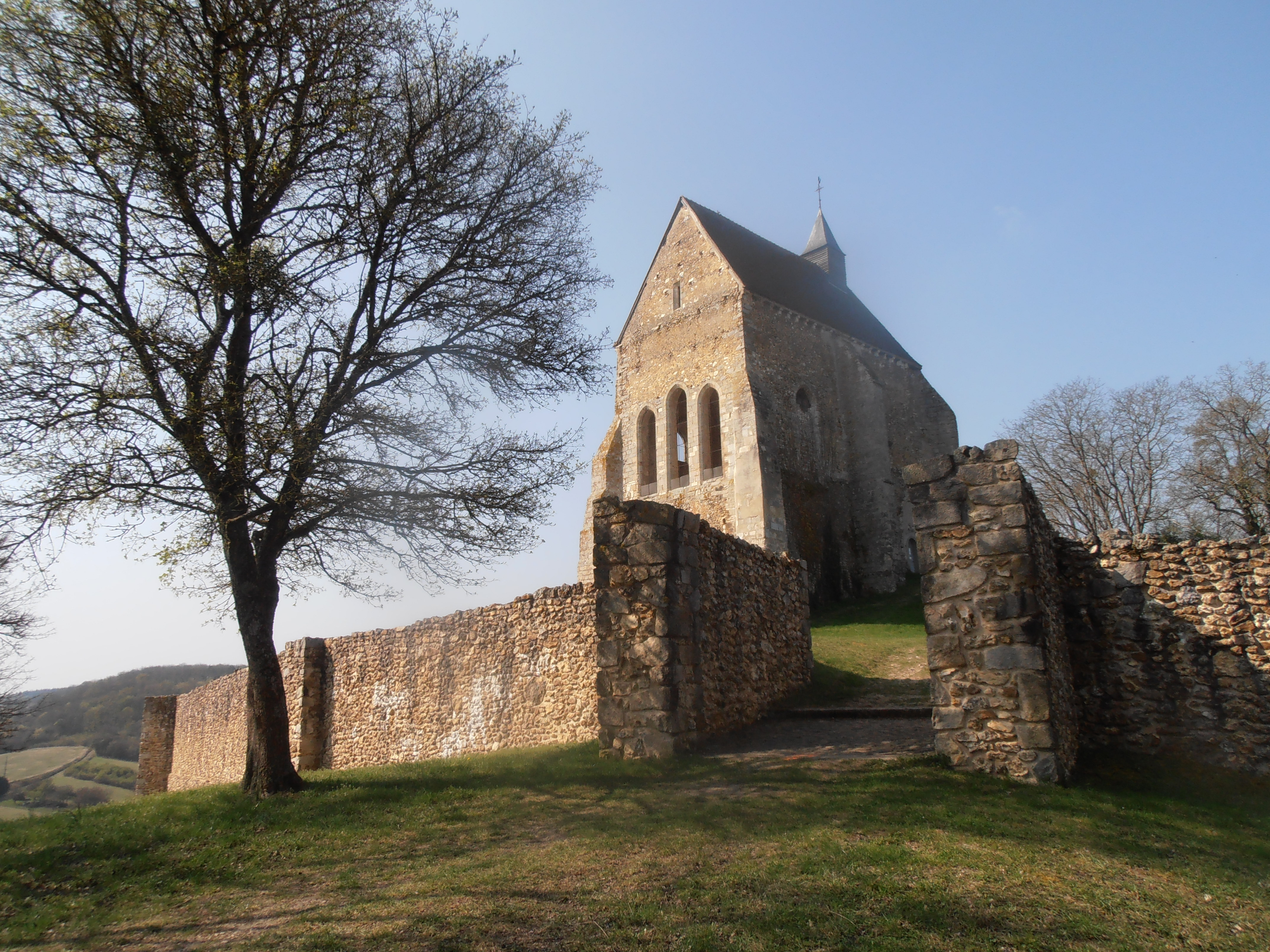 la chapelle de Vauguillain vue de la Poterne (saint-Julien-du-Sault) Yonne, France